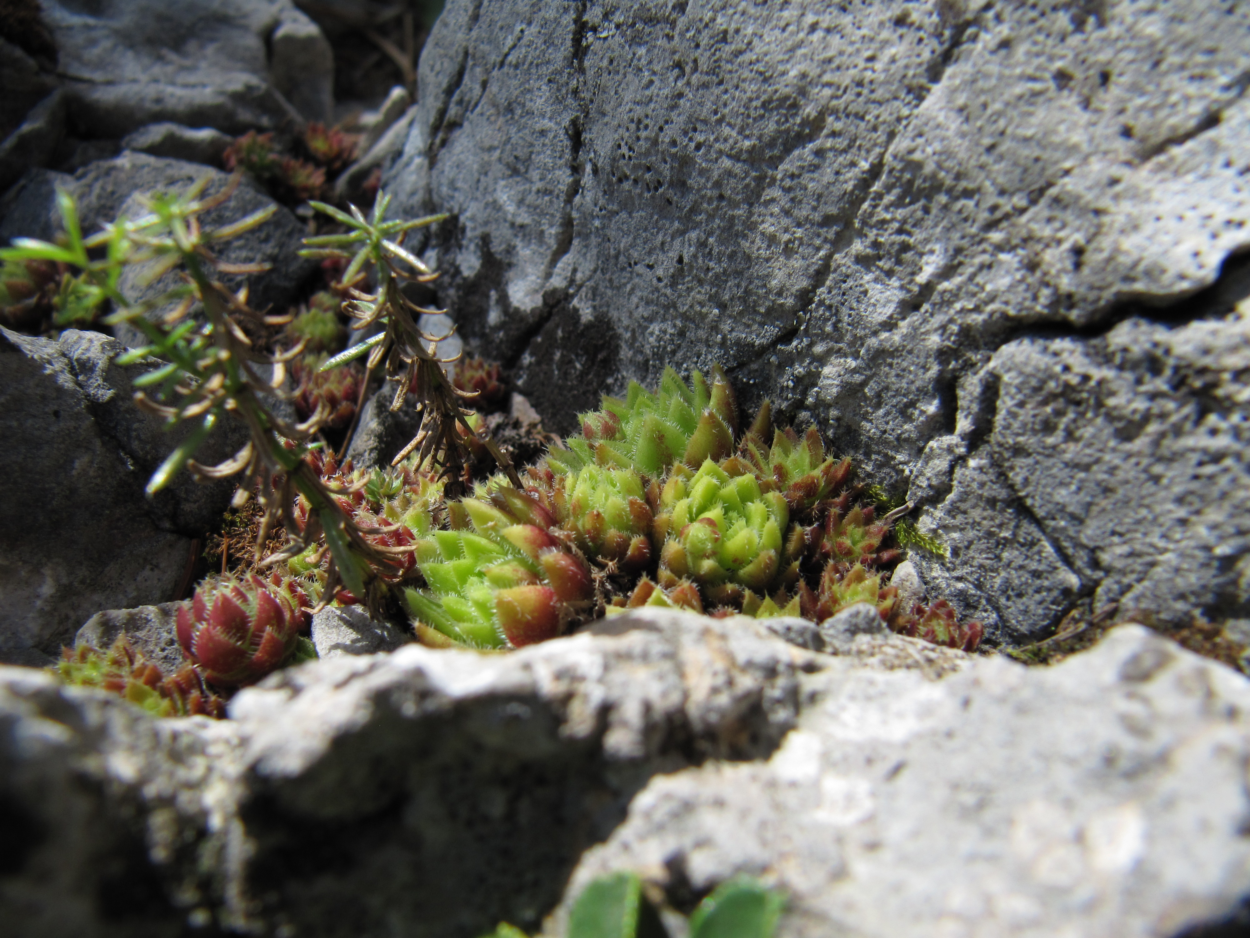 Berghauswurz am Wachthüttelkamm auf der Rax.